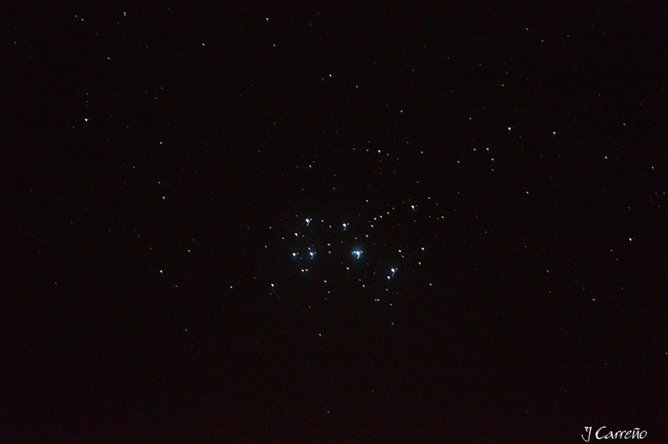 fotografía de las pleyades, emulando como se ve a simple vista una noche de buena observabilidad